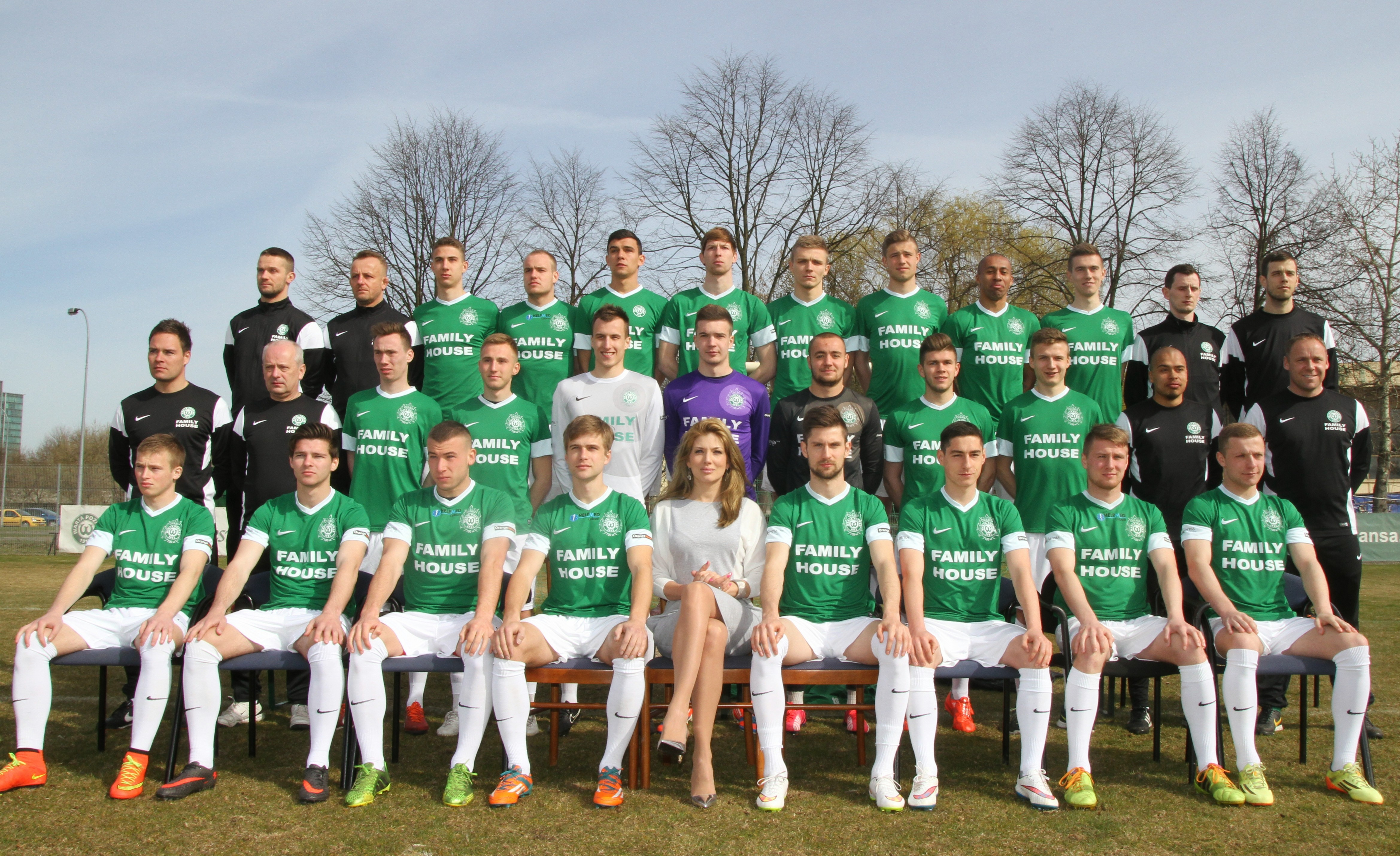 Zespół piłkarski Warta Poznań